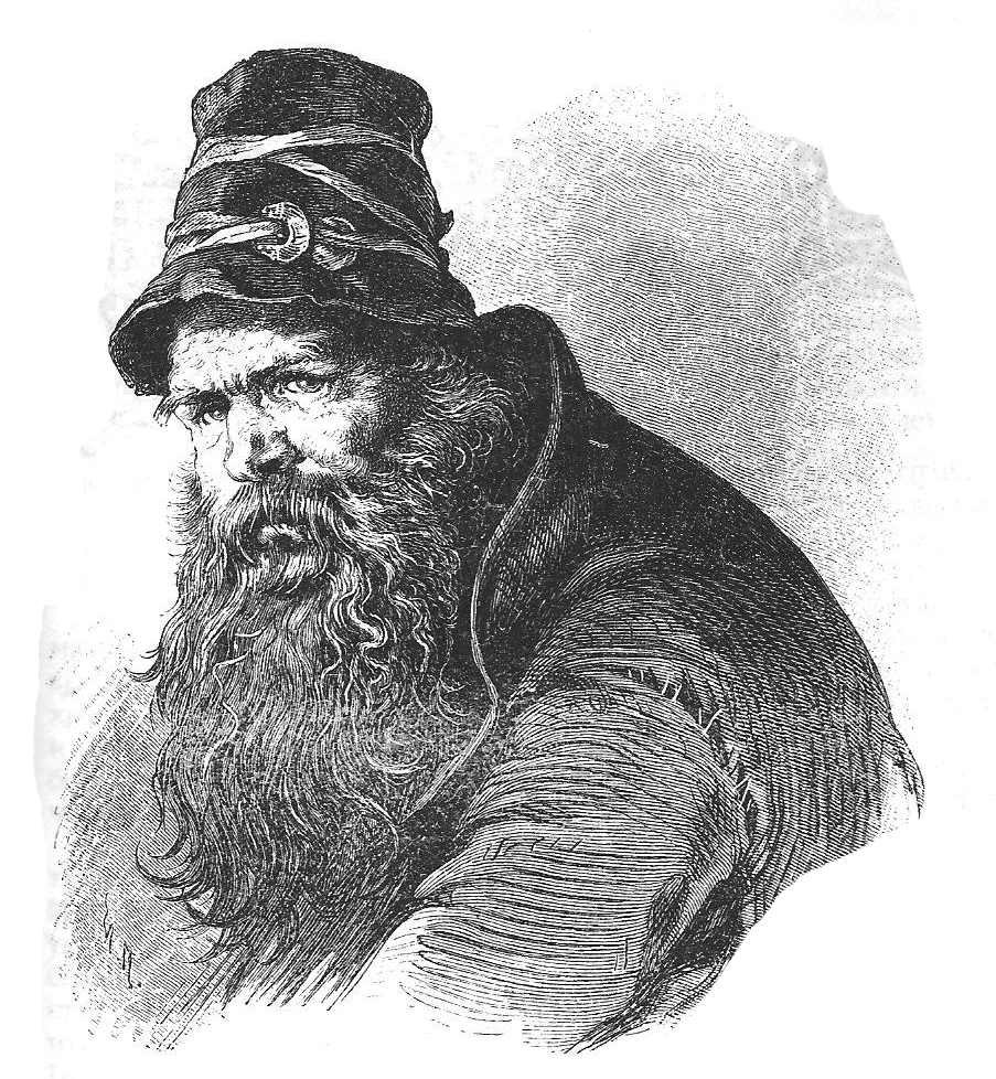 «Колдун», литография